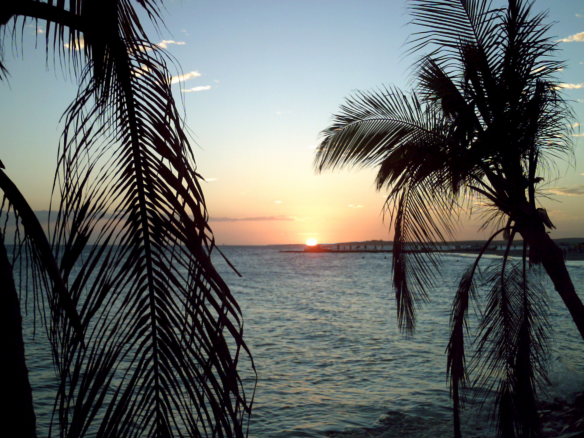 Yaque Beach